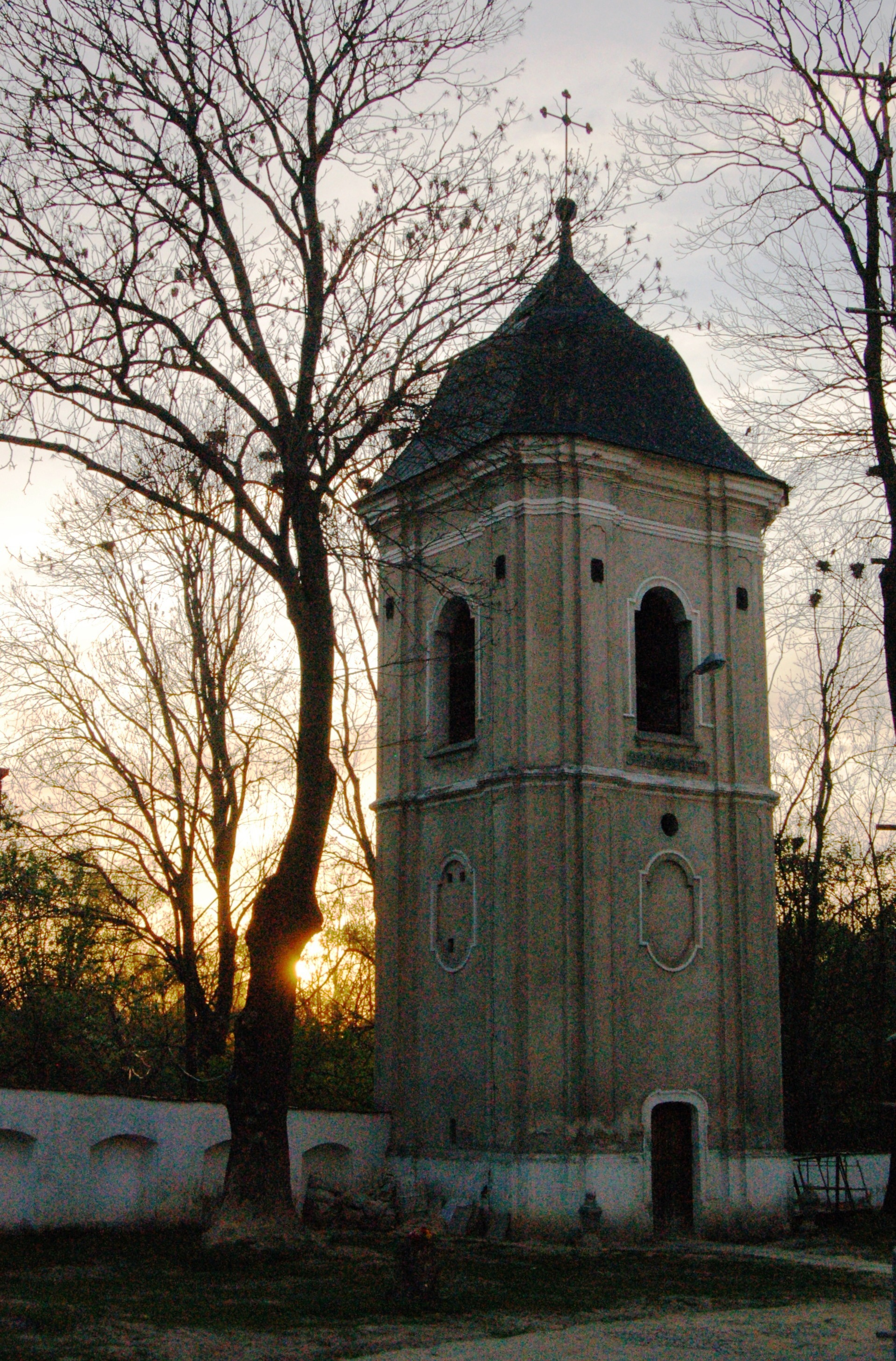 Glockenturm in Polen